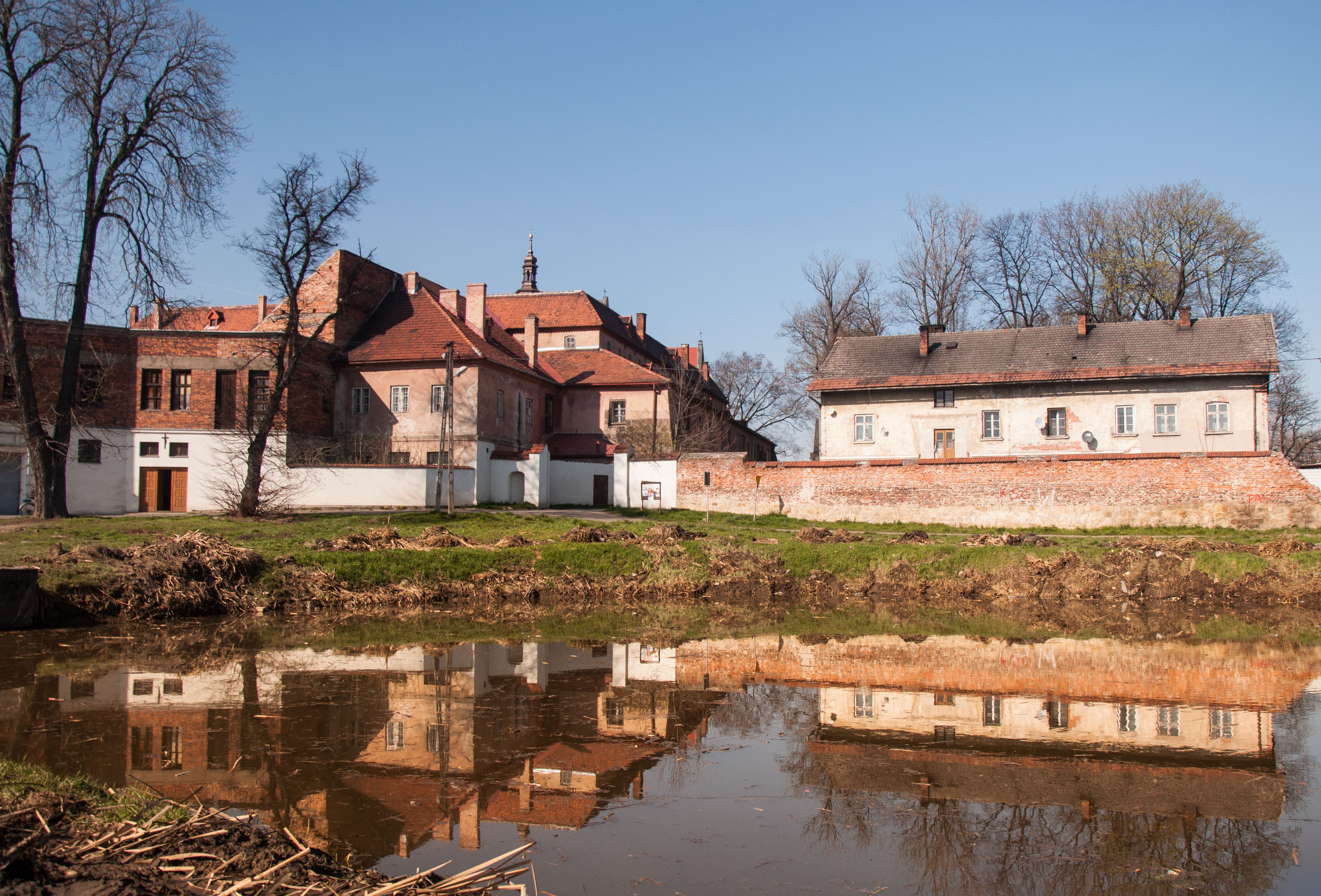 Staniątki, klasztor, XIV, 1638-1650, 1910